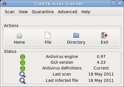 ClamTkのGUIインターフェースVersion4,33